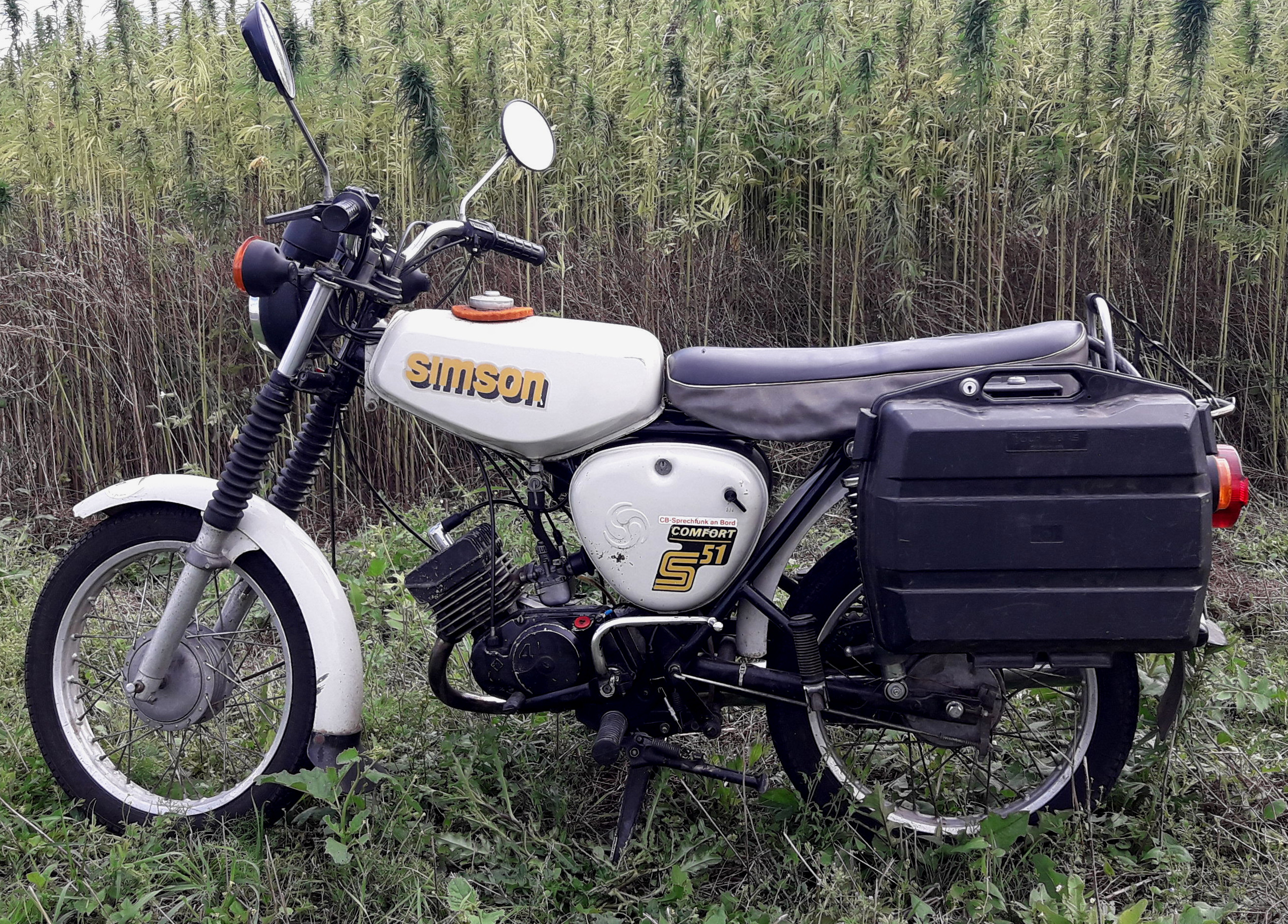 Unrestaurierter Originalzustand, es ist keine /1 also noch 6V. Seitenkoffer zeitgenössisches Zubehör